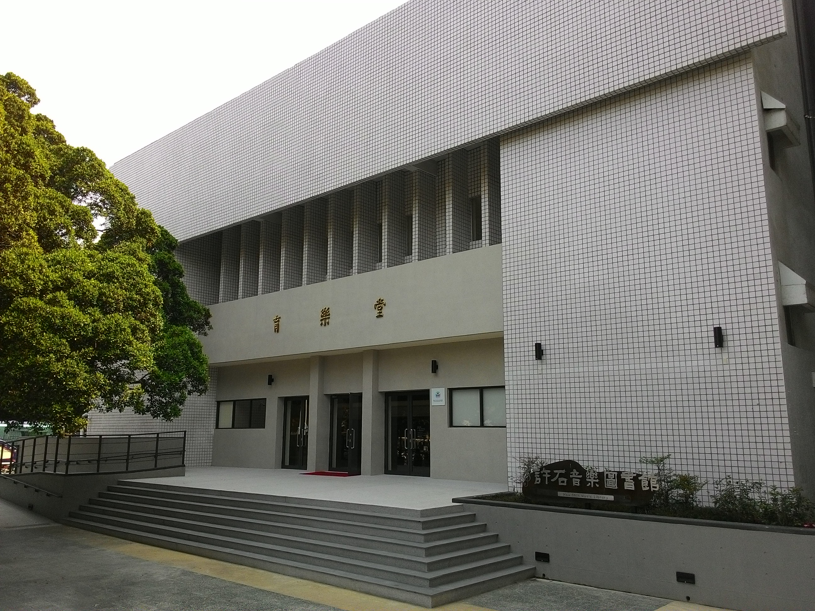 中文（台灣）: 許石音樂圖書館